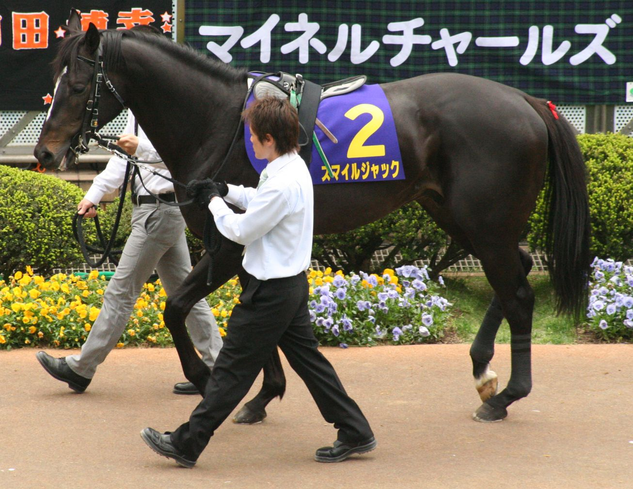 スマイルジャック（中山競馬場 第68回皐月賞）